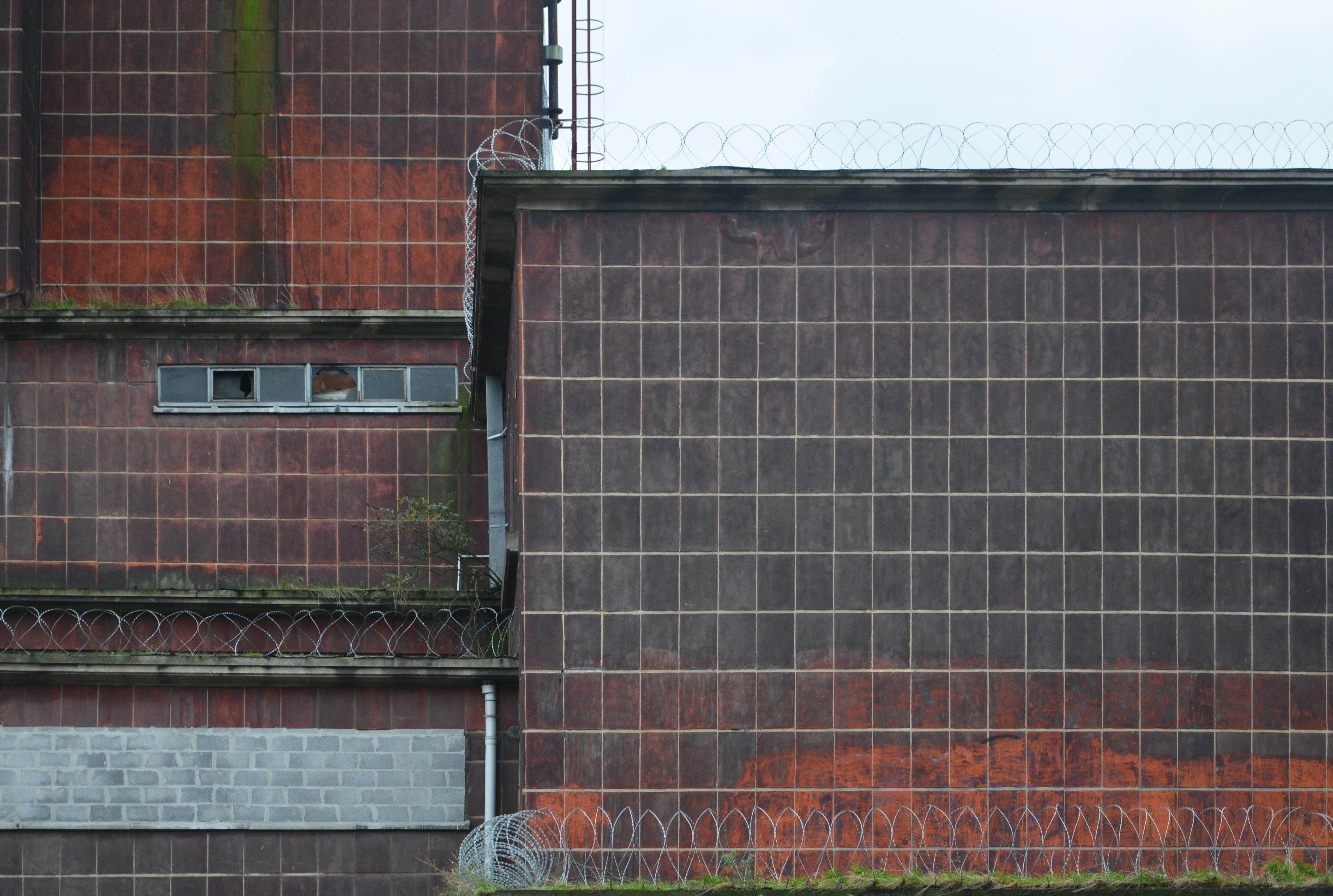 Détail de la façade du Palais permanent de la ville de liège